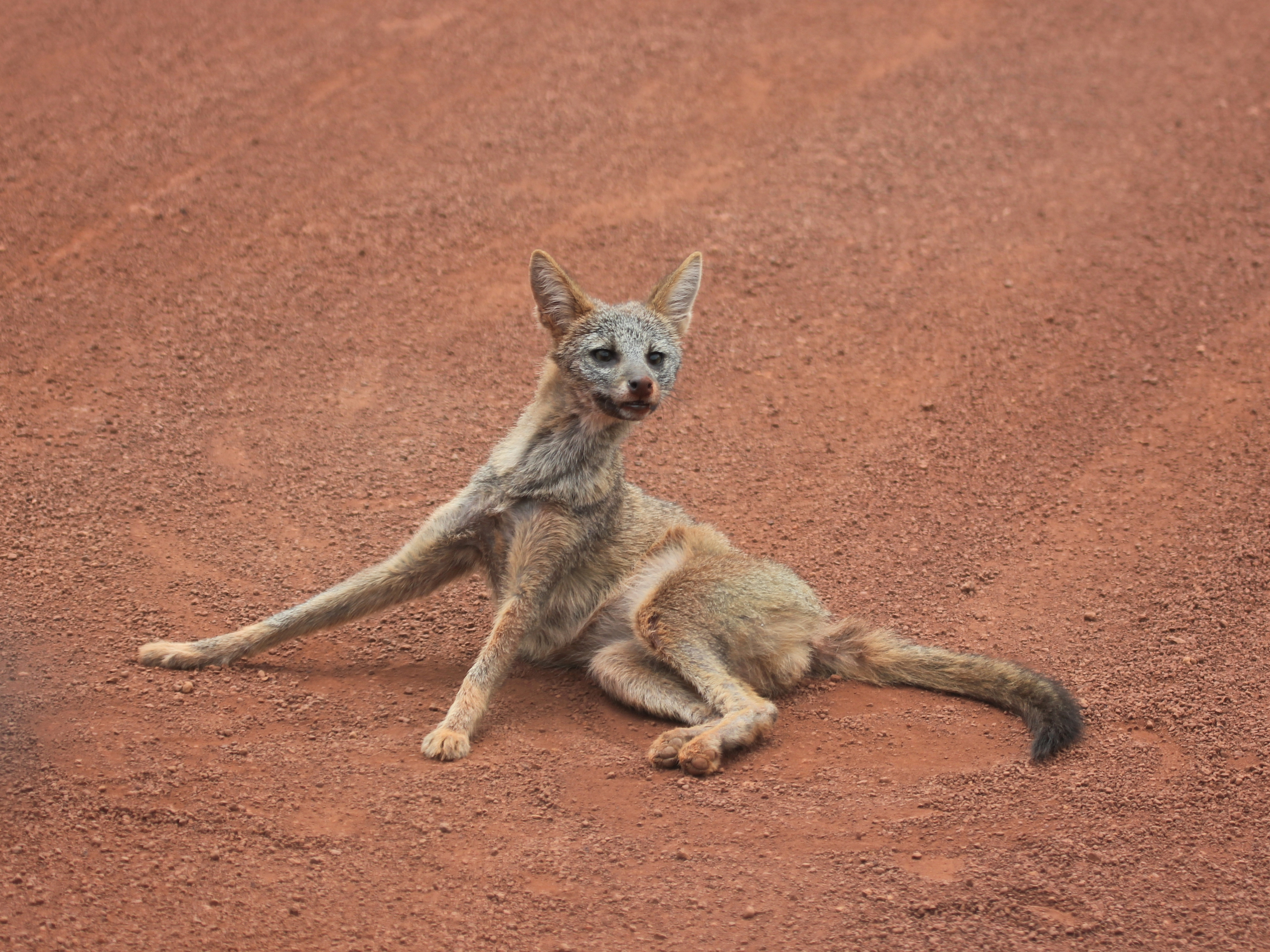 Angefahrener Brasilianischer Kampfuchs (Lycalopex vetulus) auf der MT-241 nordöstlich von Nobres, Brasilien